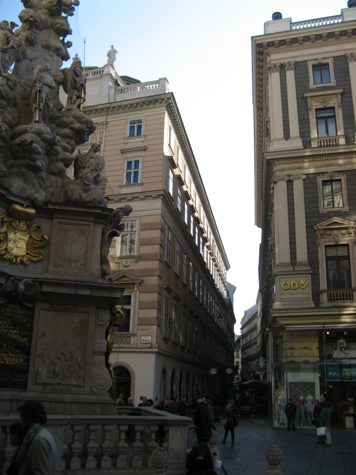 Bräunerstraße vom Graben aus gesehen, Wien-Innere Stadt